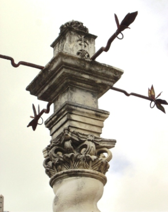 Imagem da minha autoria para ser usada na ilustração da descrição da página sobre o Pelourinho de Esgueira, recentemente editada por mim.